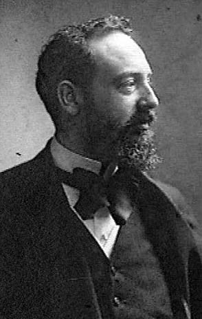 José Garnelo y Alda